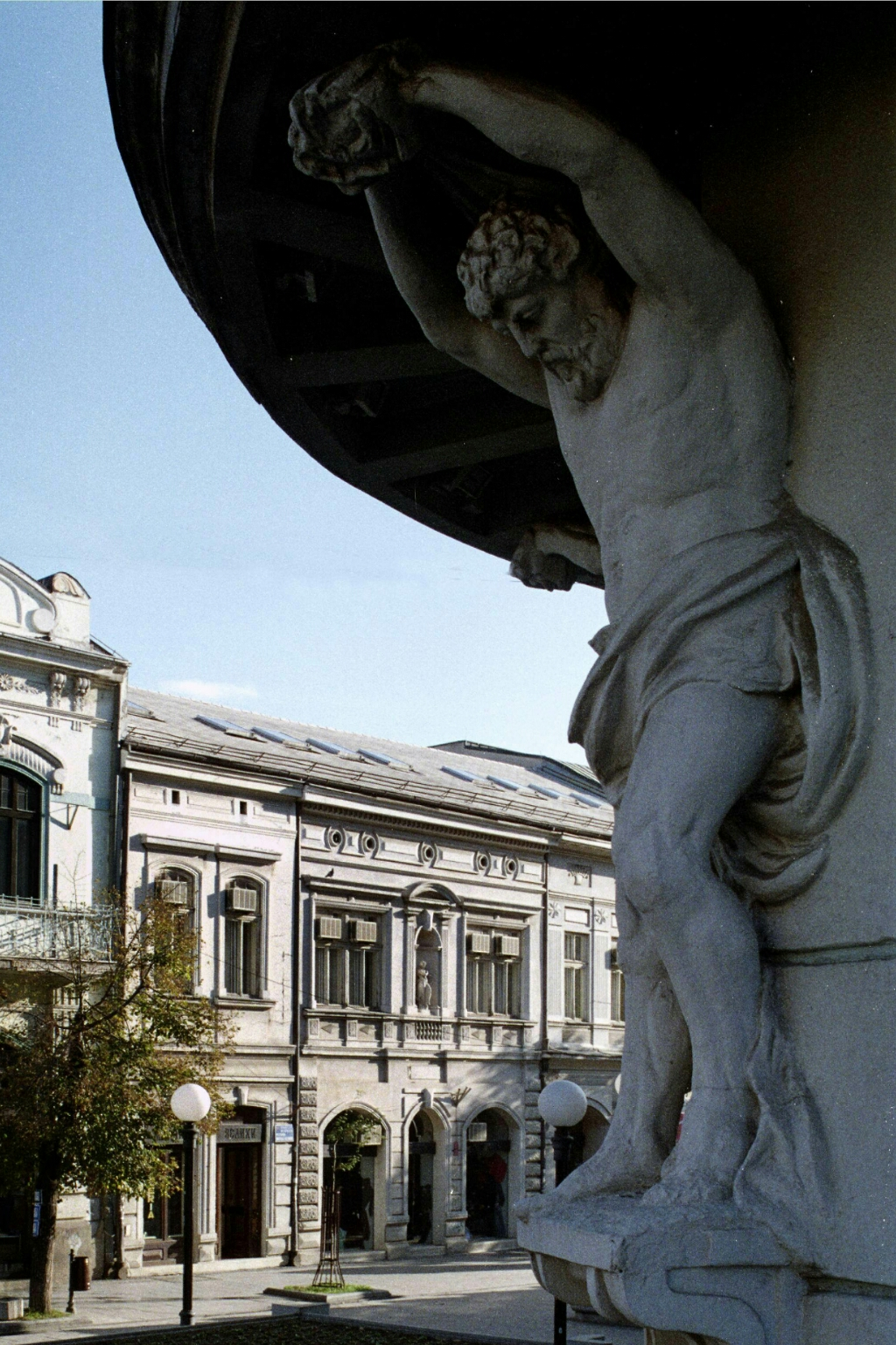 Architecture in Kragujevac, Serbia/Architecture à Kragujevac, Serbie